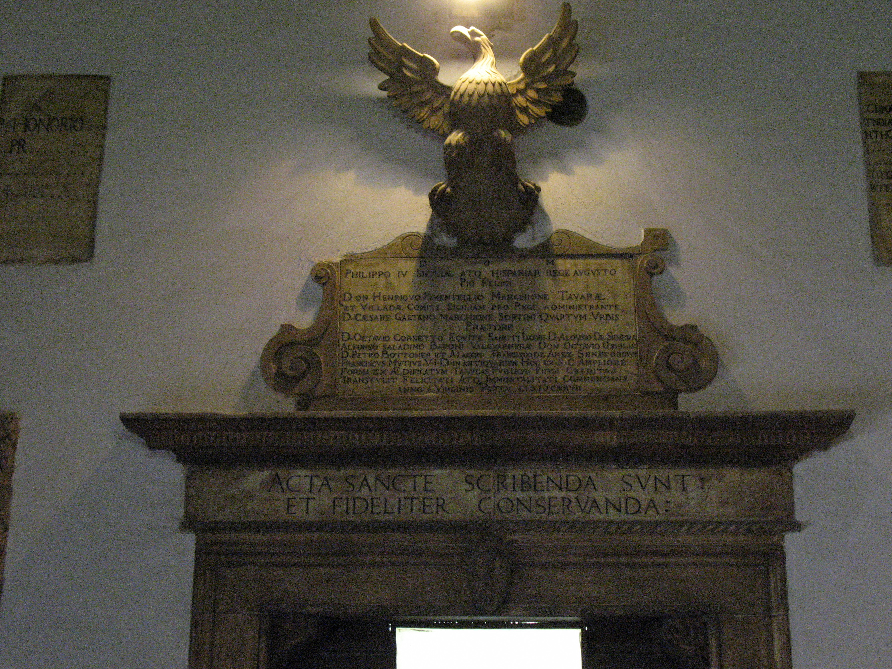 Cortile interno del Palazzo Pretorio di Palermo